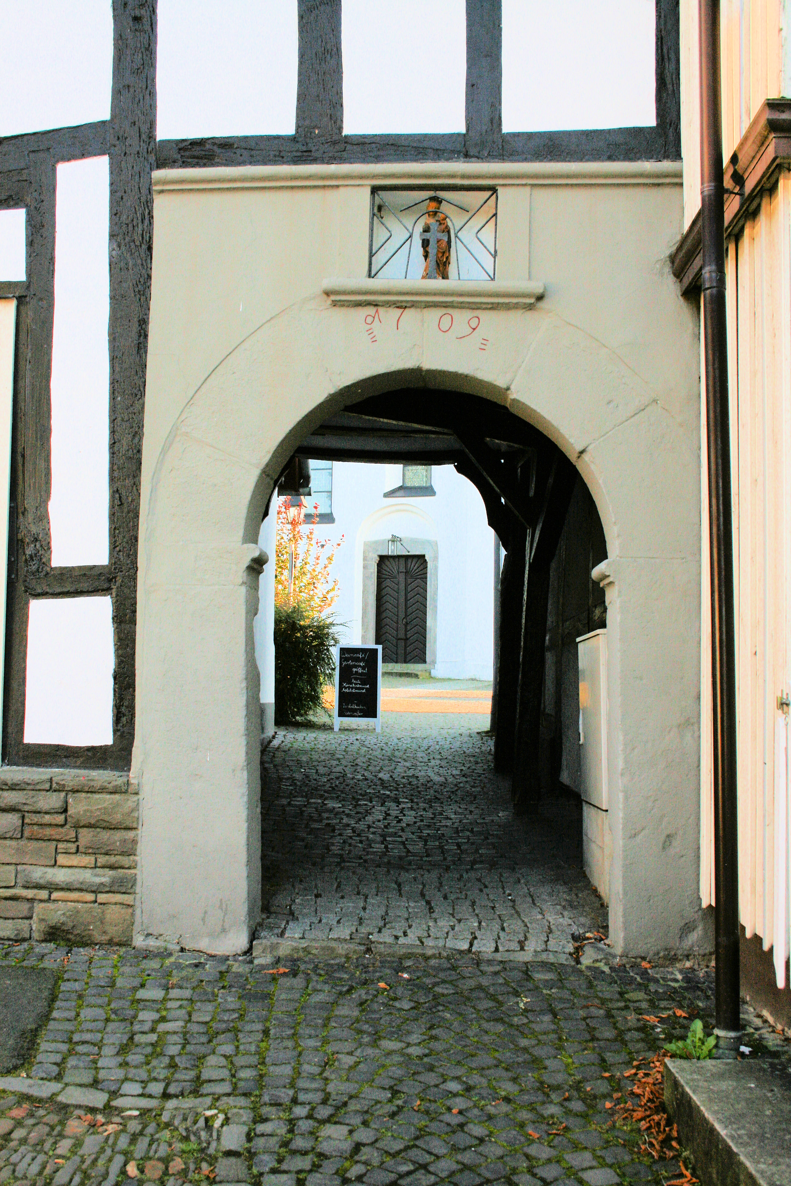 Stadt Blankenberg, Tordurchgang